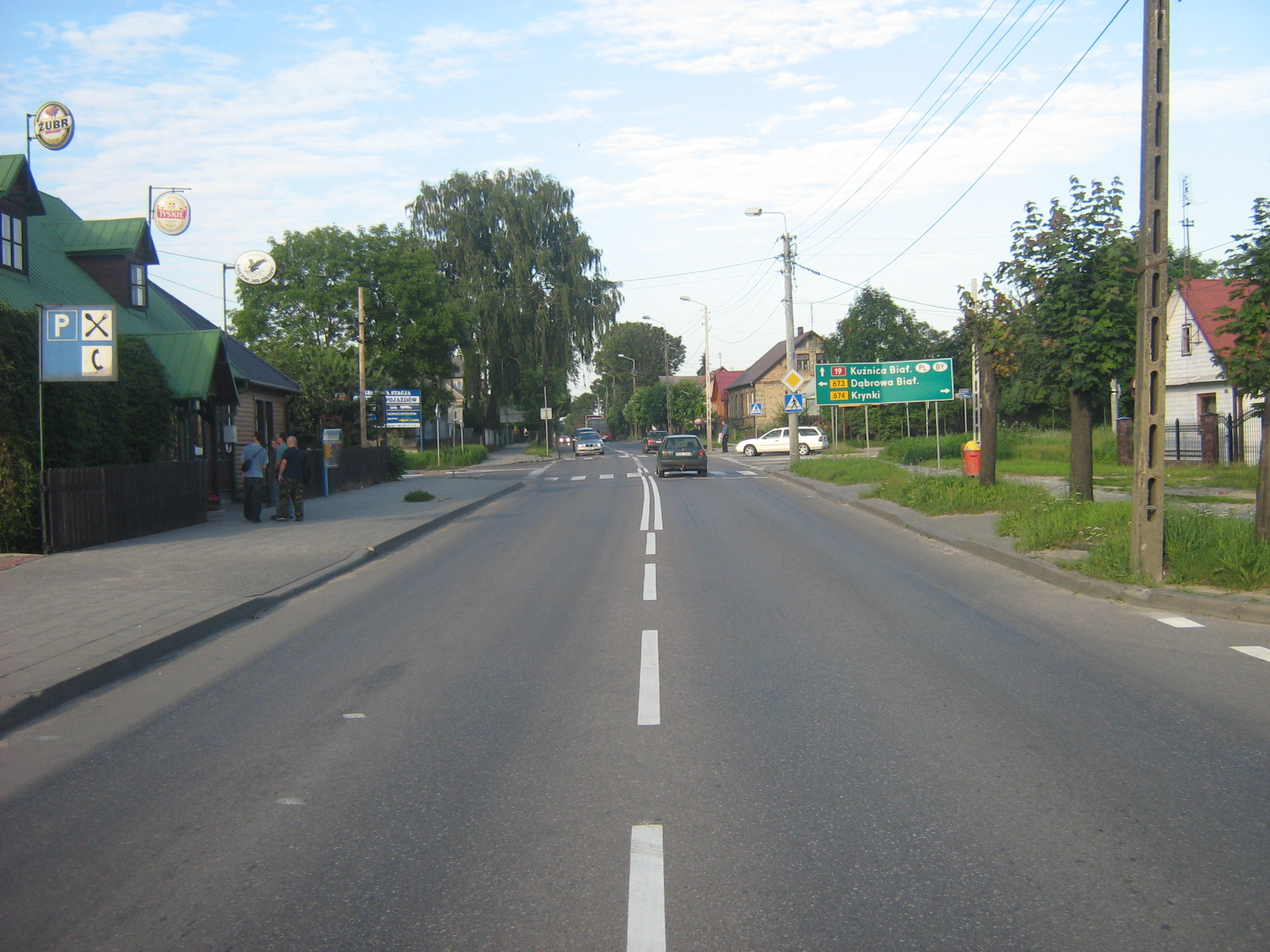 Droga krajowa nr 19 w Sokółce (kier. Kuźnica).